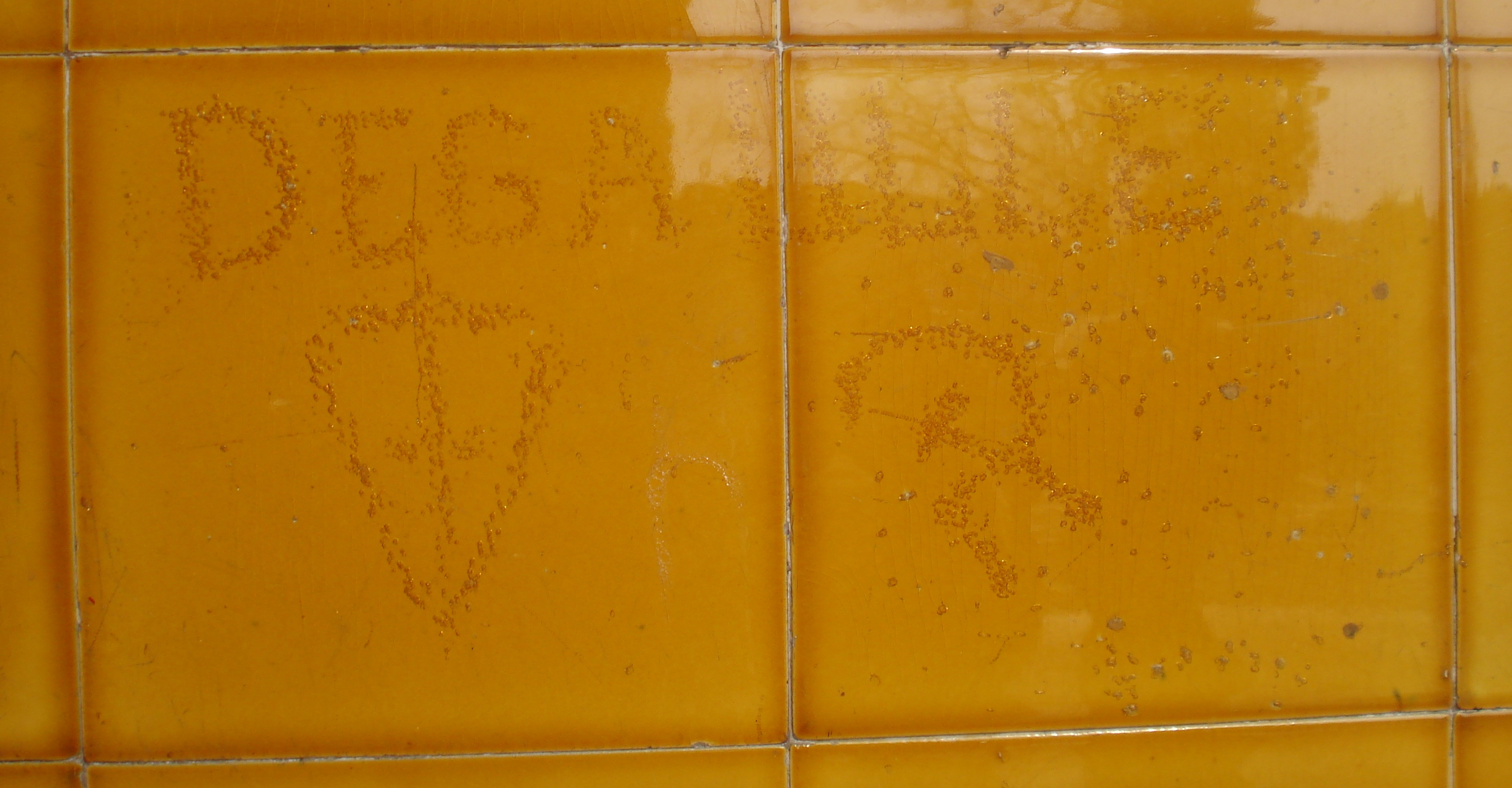 Punzierte Graffiti aus der Zeit der französischen Besatzung 1945/46 auf den Kacheln links neben der Eingangstür. Man erkennt den Namen DEGAULLE, ein "Croix de Lorraine" sowie Hammer und Sichel.